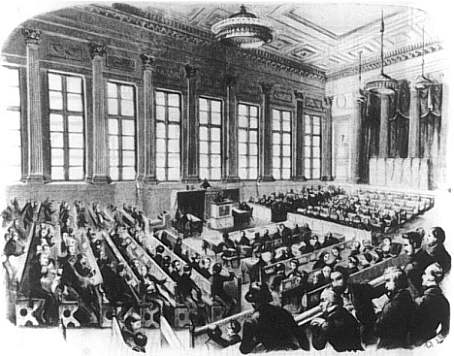 Konstituierende Sitzung der Preußischen Nationalversammlung in der Sing-Akademie zu Berlin 1848, Holzstich, veröffentlicht in der Illustrierten Zeitung, Berlin, 1848, XI. Band, Nr. 265, Seiten 72-73